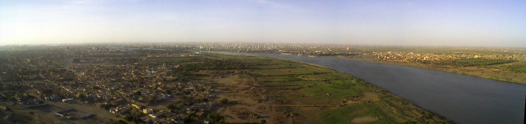 Hartum_ve_Mavi_Nil.jpg